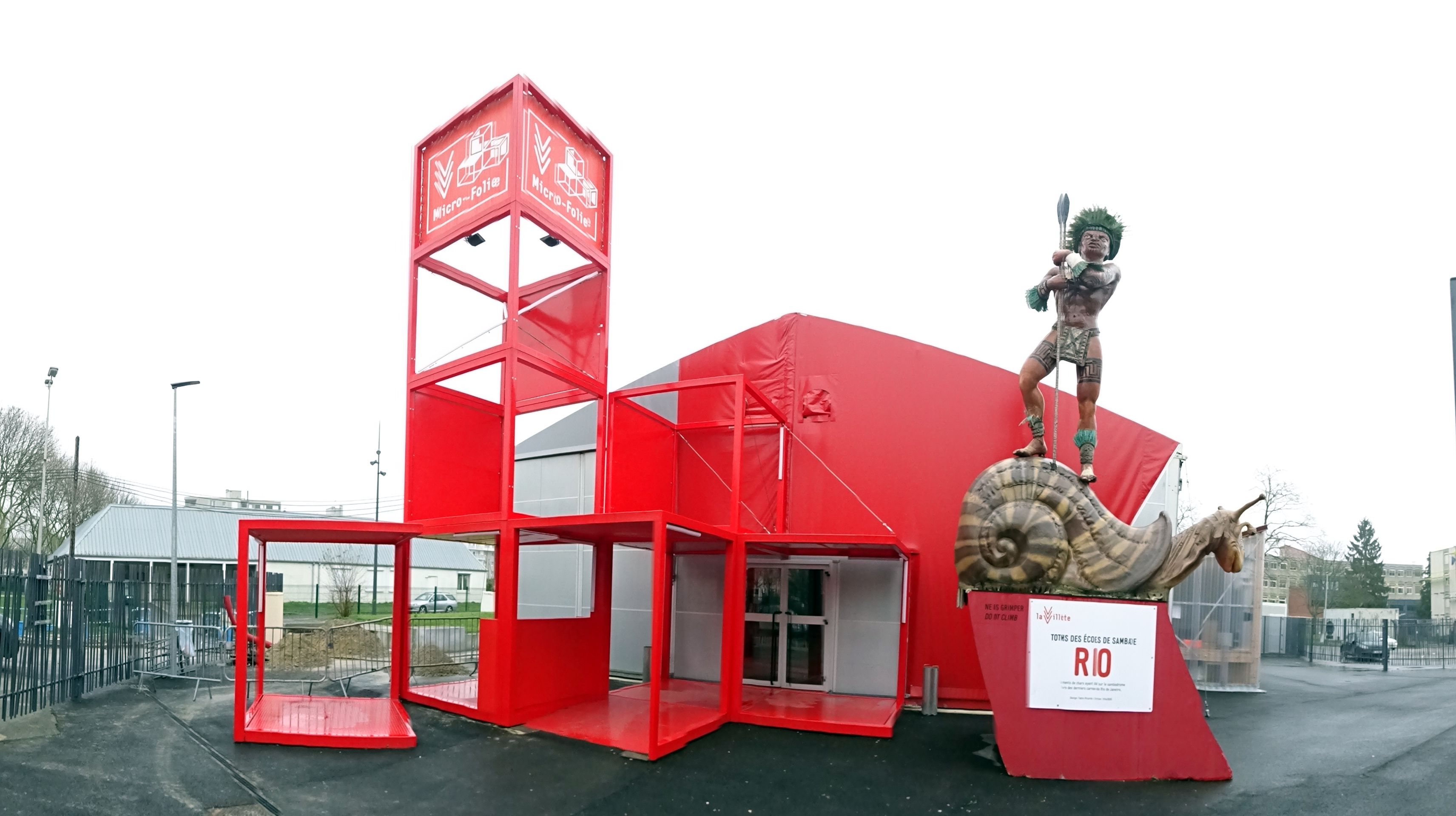 Formation à la Micro-Folie de Sevran des encadrants des futurs ateliers WikiSevran pour 2018.